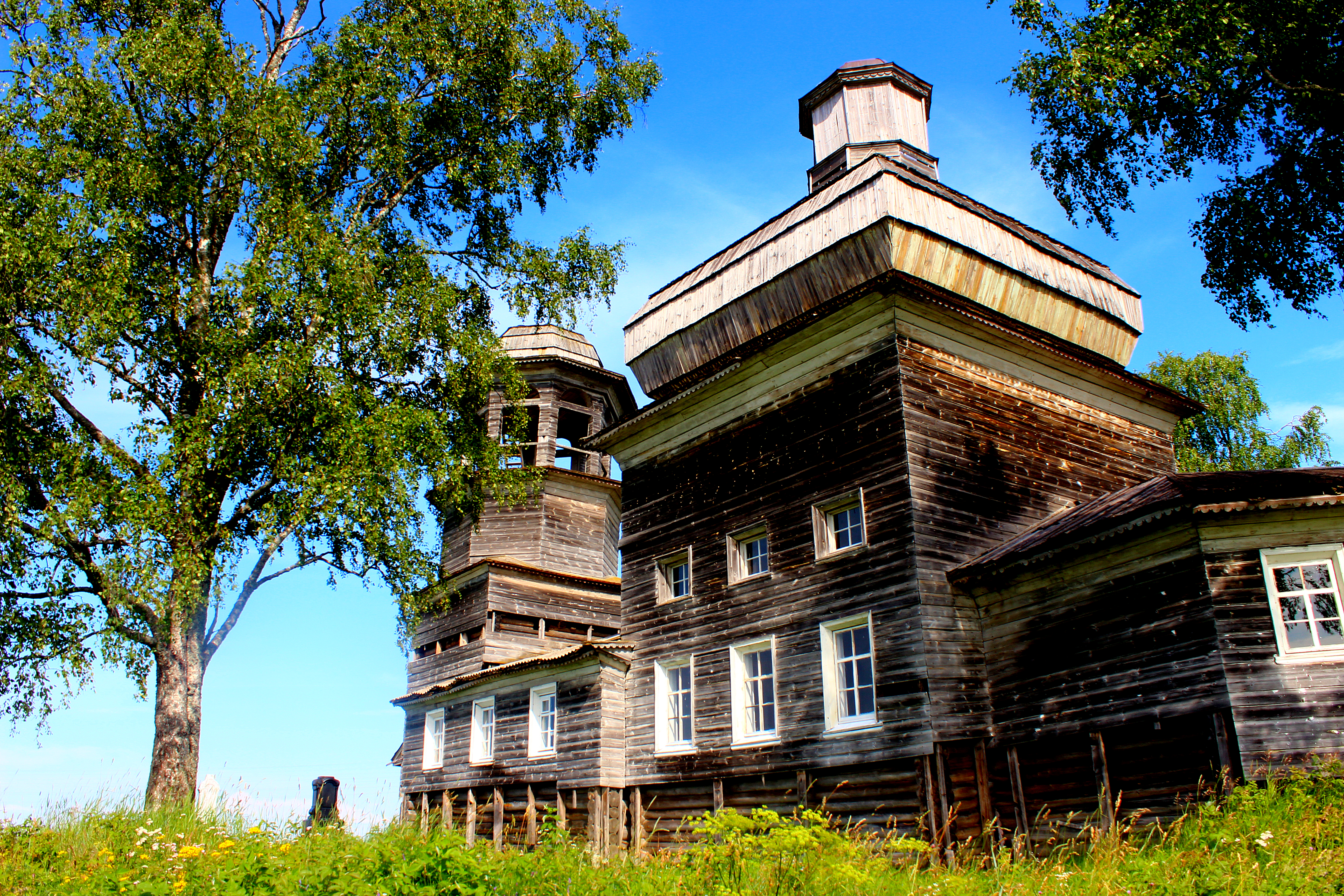 (Архангельская область, Онега, деревня Поле)